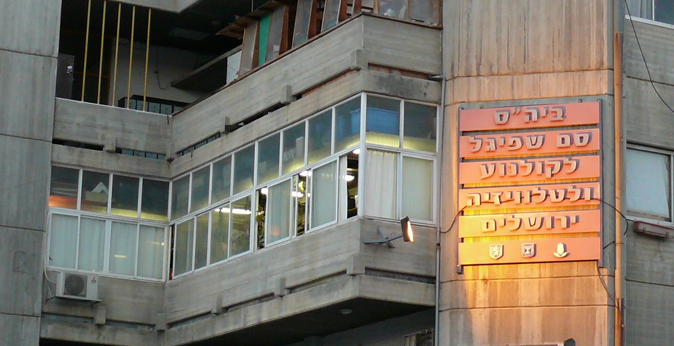 מבנה ביהס סם שפיגל